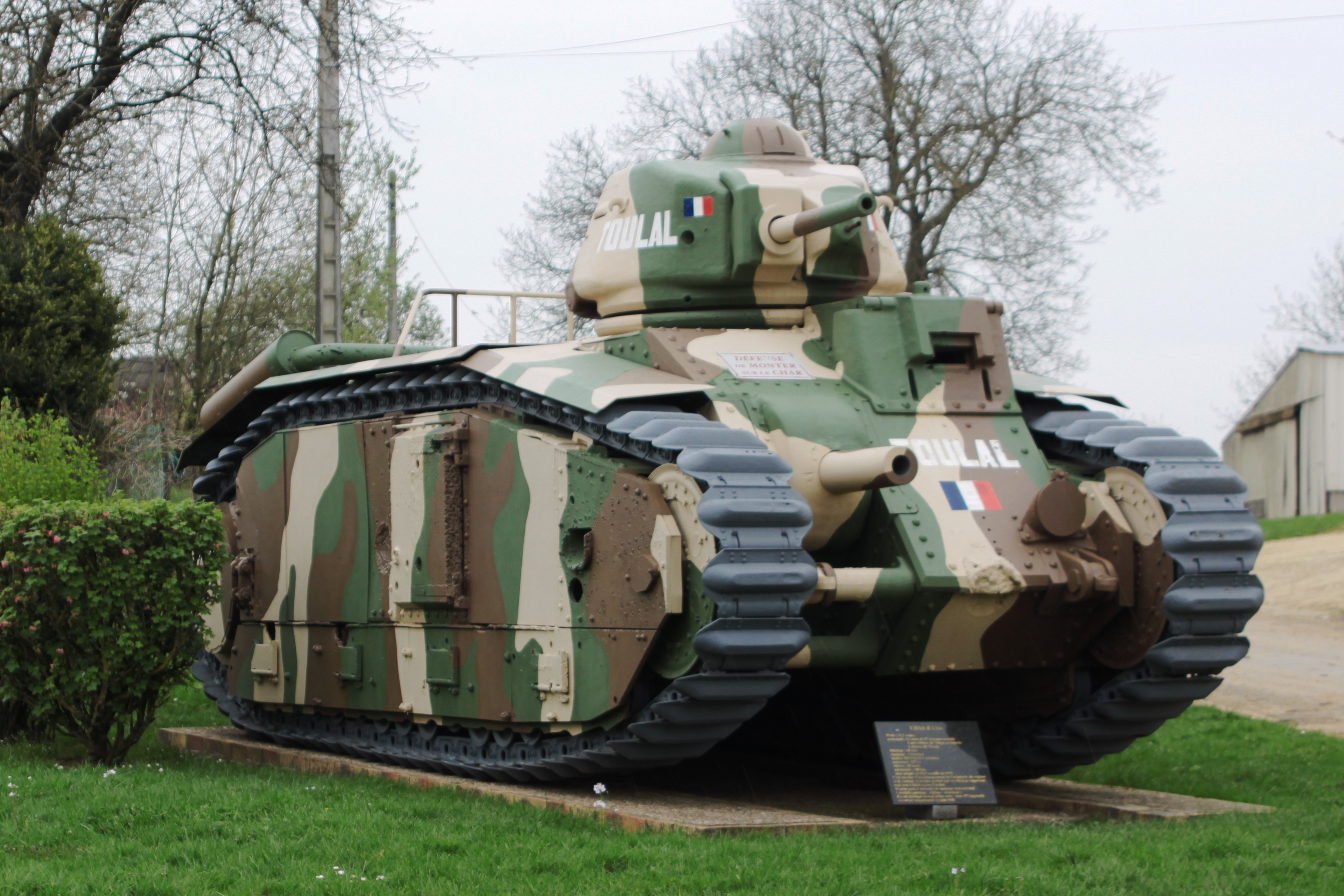 Char B1 bis "Toulal" à Stonne (Ardennes)